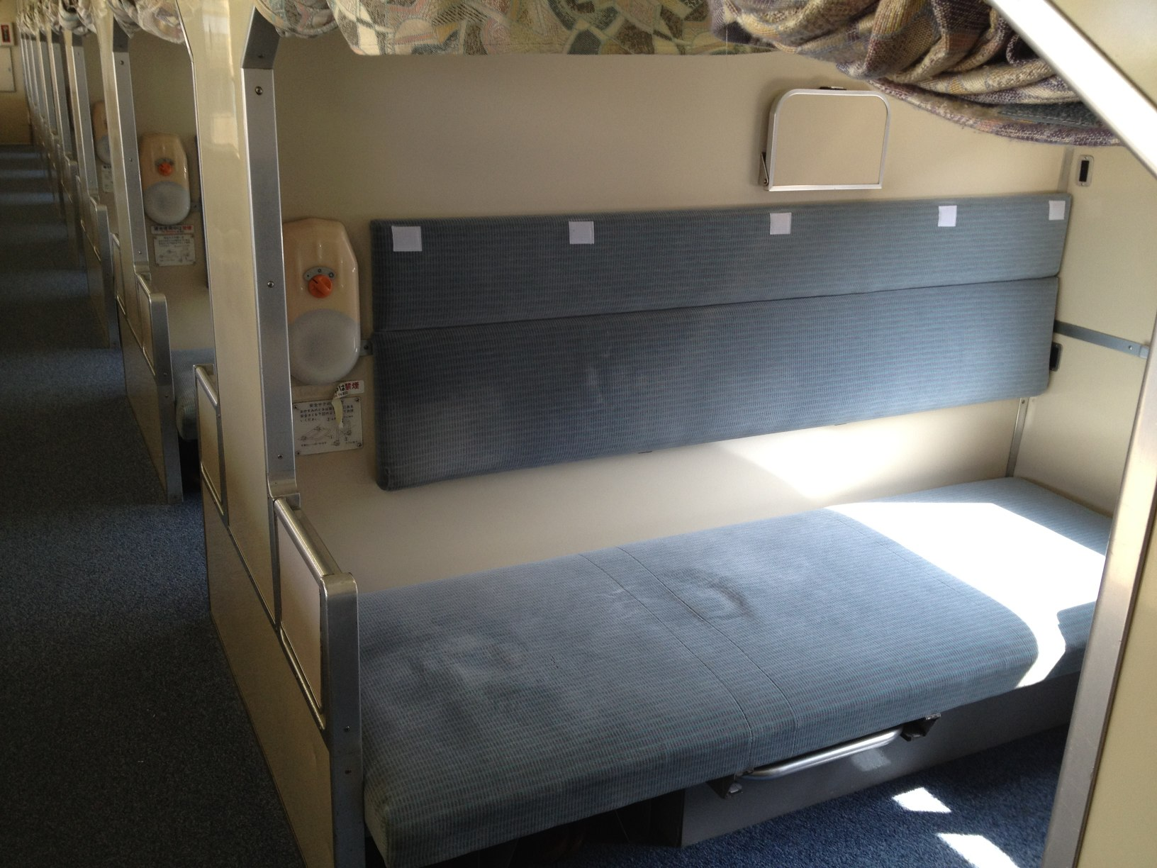 寝台特急あけぼの 上野発の夜行列車